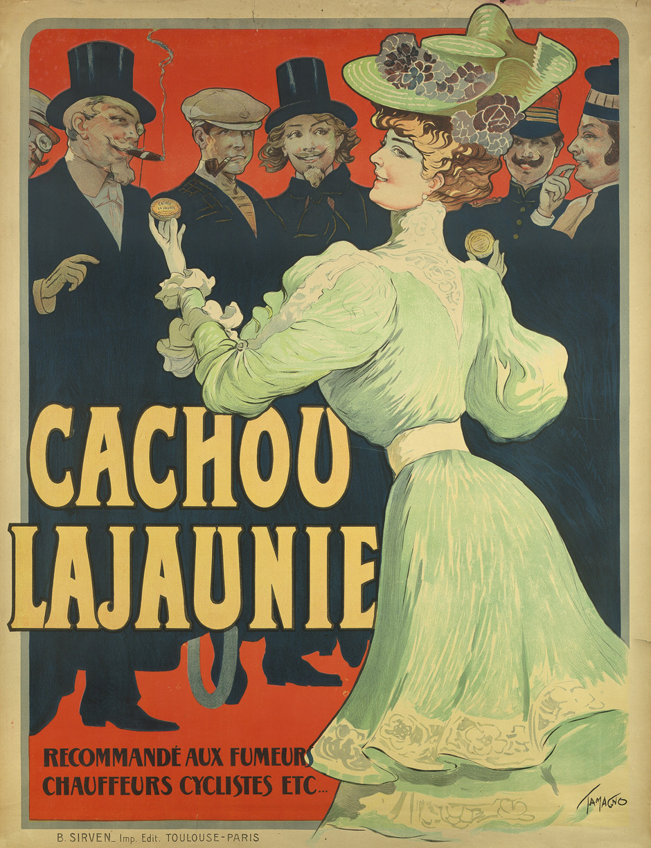 Cachou Lajaunie. Recommandé aux Fumeurs Chauffeurs Cyclistes etc. Großplakat, Farblithographie. 129,5 x 100 cm. Toulouse und Paris, B. Sirven, um 1890.